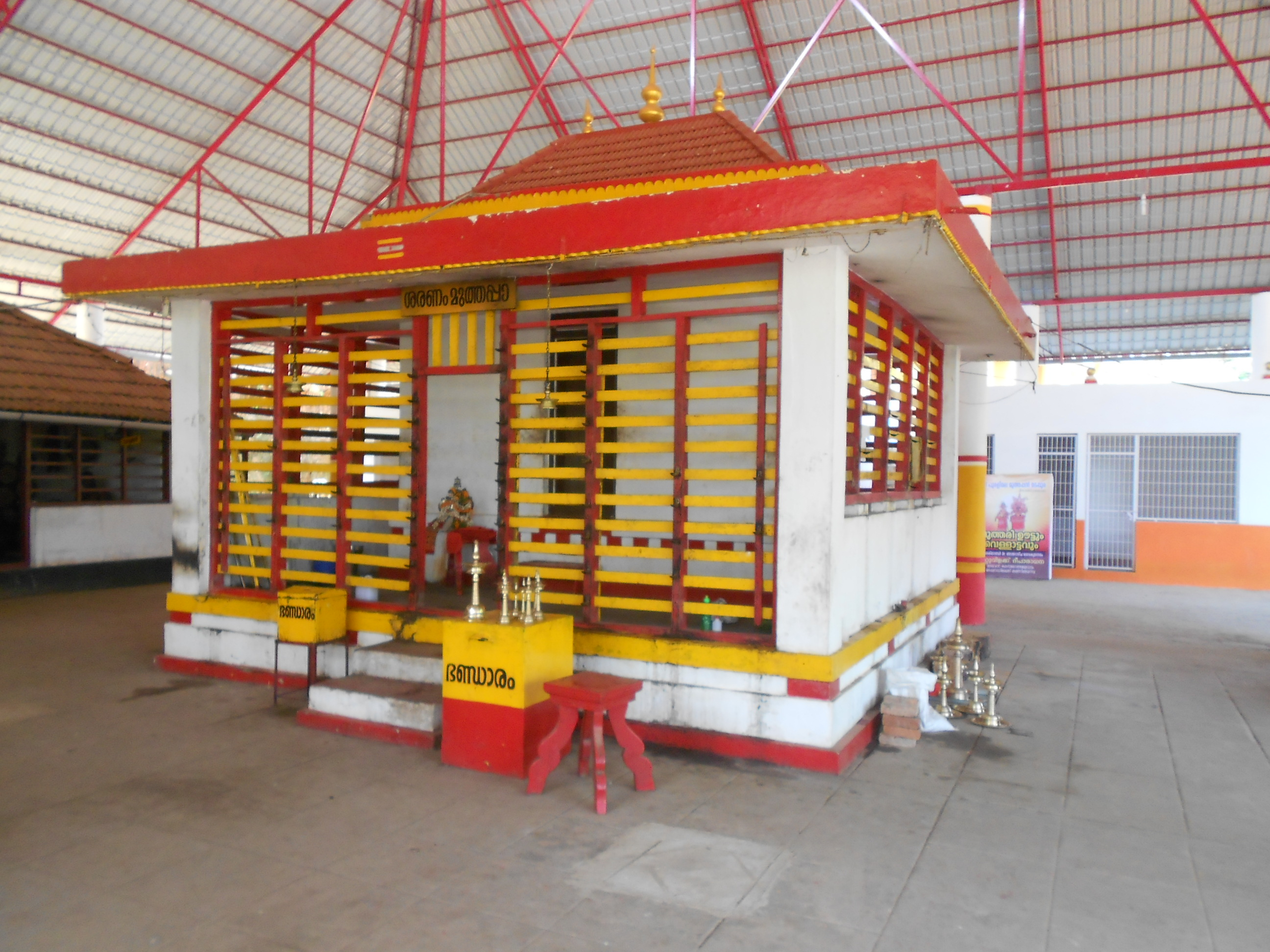 പറശ്ശിനിക്കടവ് മുത്തപ്പന്റെ ആരൂഢ സ്ഥാനമായ പുരളിമല മുത്തപ്പ ക്ഷേത്രം.